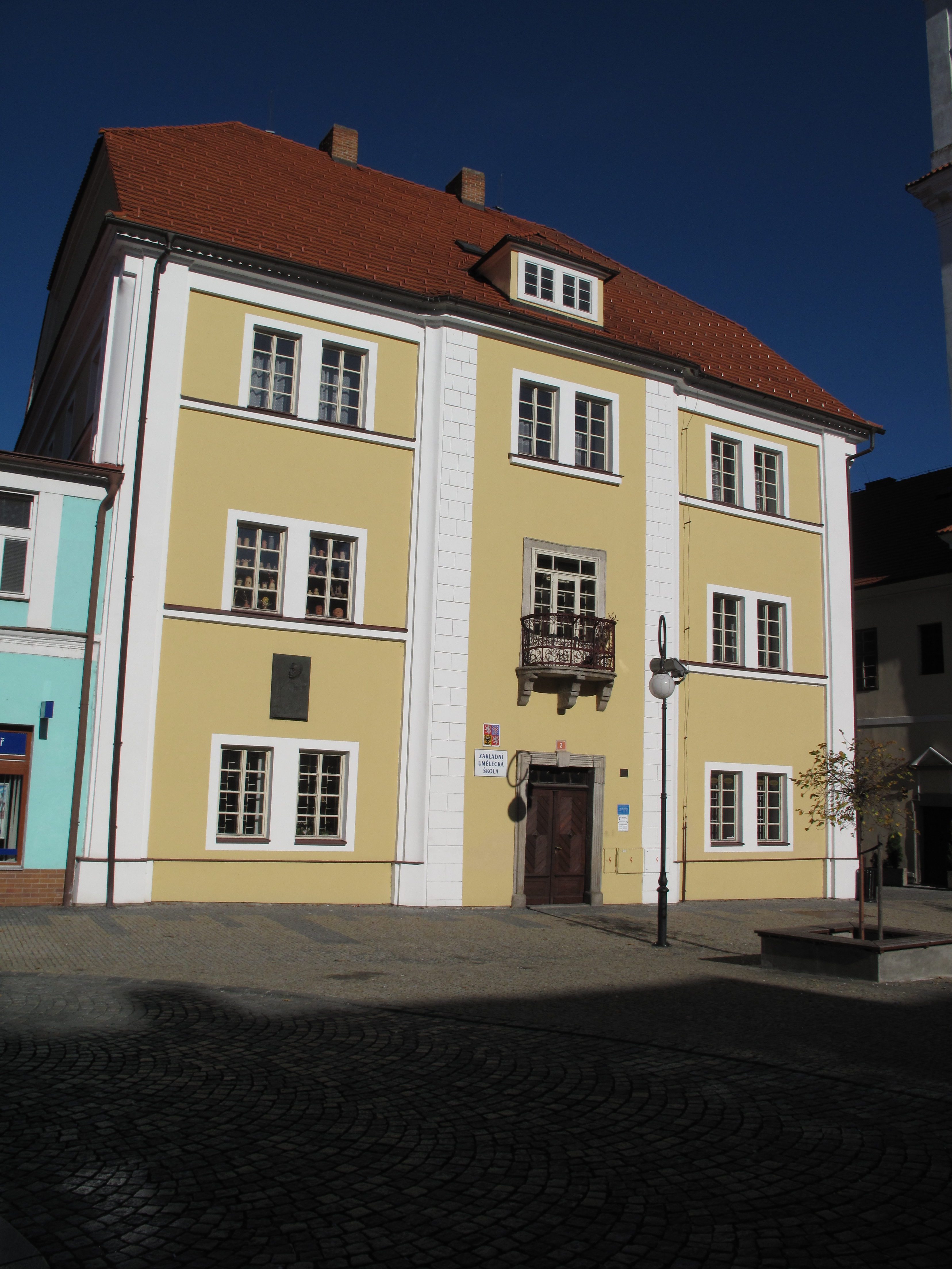 Dům v Březnici. Okres Příbram, Česká republika.